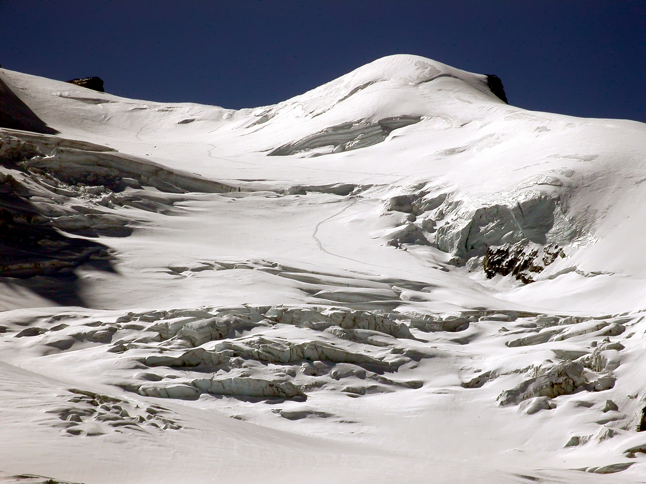 Il Ghiacciaio del Laveciau - Alpi Graie - Italy